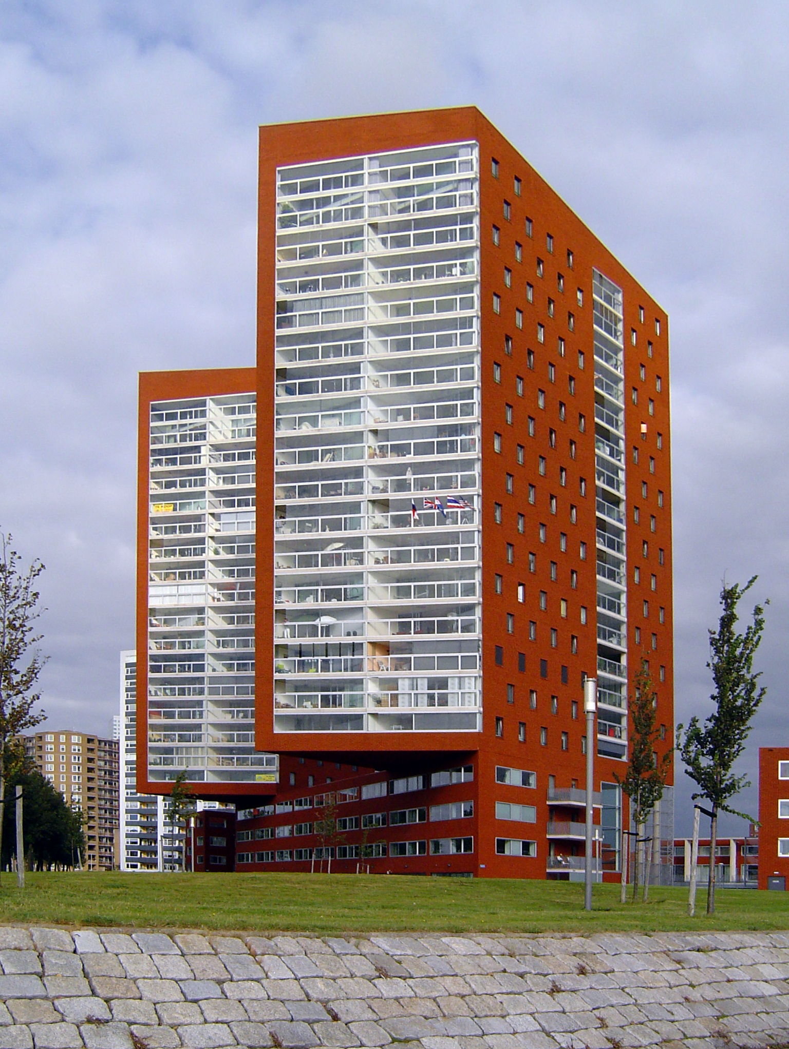 Modern buildings Poseidon and Neptunus "Appartementencomplex 2e Katendrechtse Haven" on Katendrecht, Rotterdam